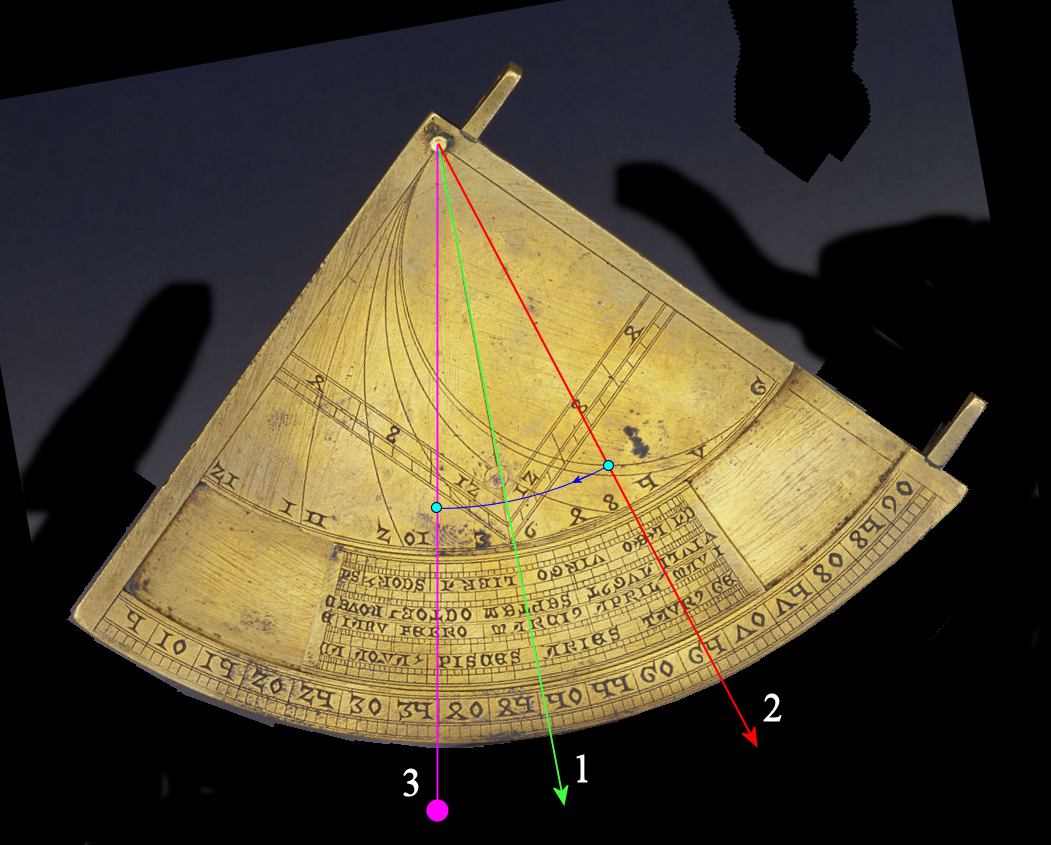 Quadrant Vetus en position d'observation ; réglage : 1 et 2, lecture : 3.